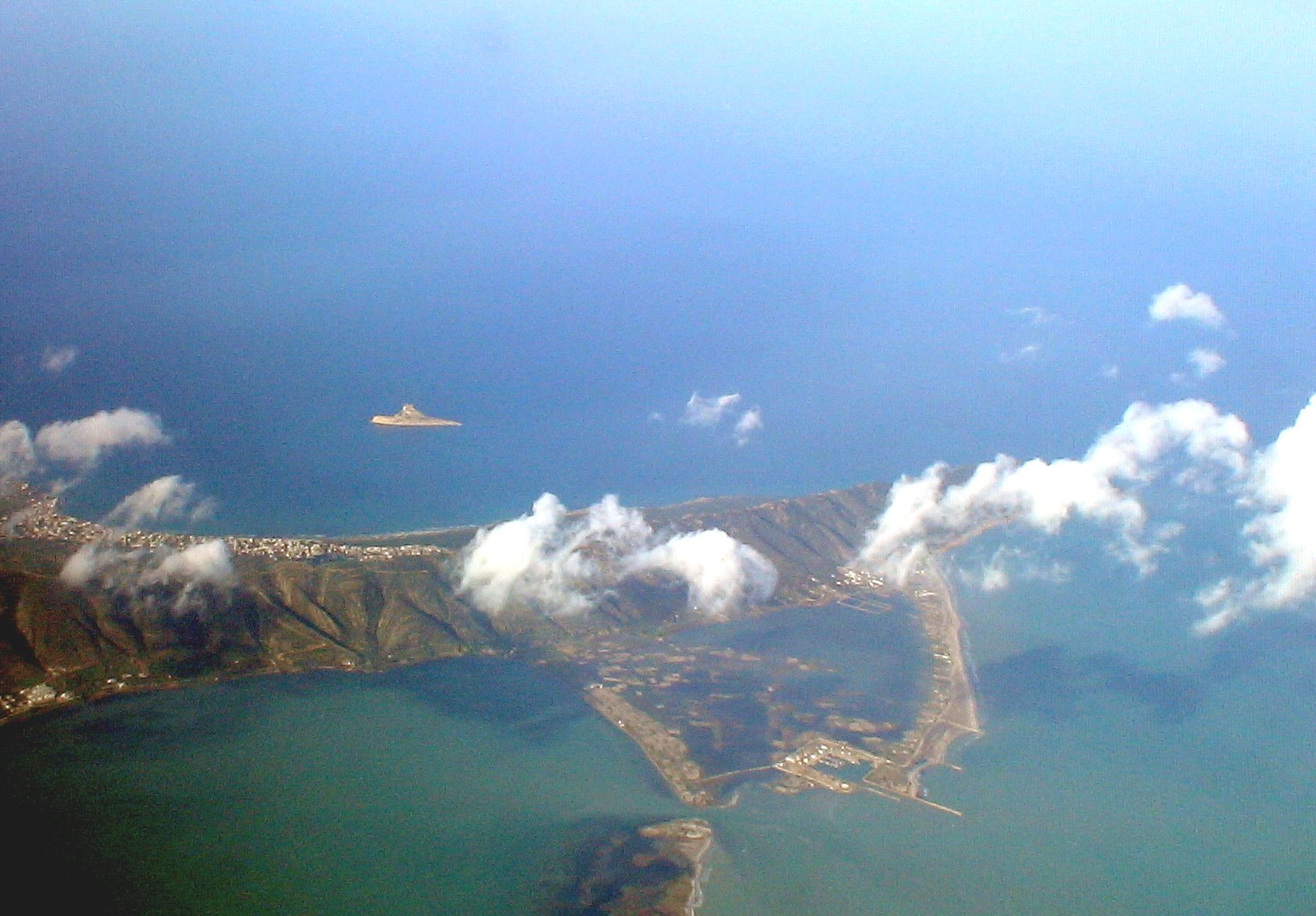 Photo aérienne du nord de la Tunisie De gauche à droite, la ville de Ghar El Melh et sa lagune, le village de Raf Raf et l'île Pilau